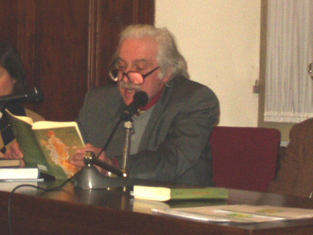 Alieto Pieri